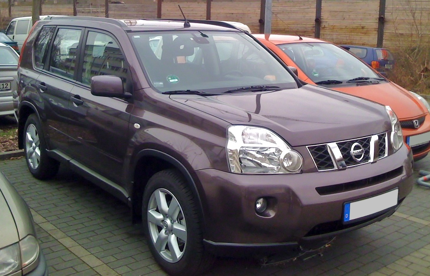 Nissan X-Trail von Sixt und Gilly aufgenommen mit meinem iPhone